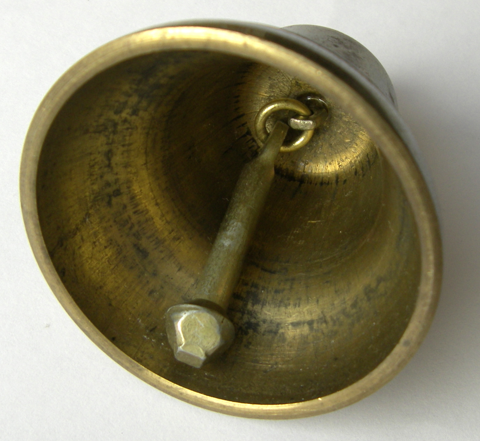 Бронзовый колокольчик (изнутри), см также Image:колокольчик.jpg